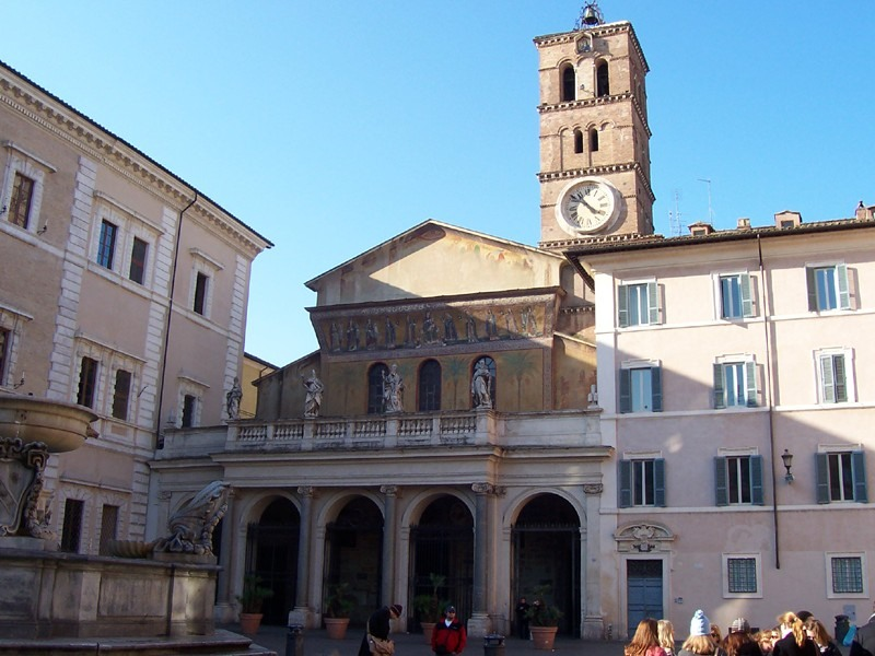 Roma - Basilica di S. Maria in Trastevere